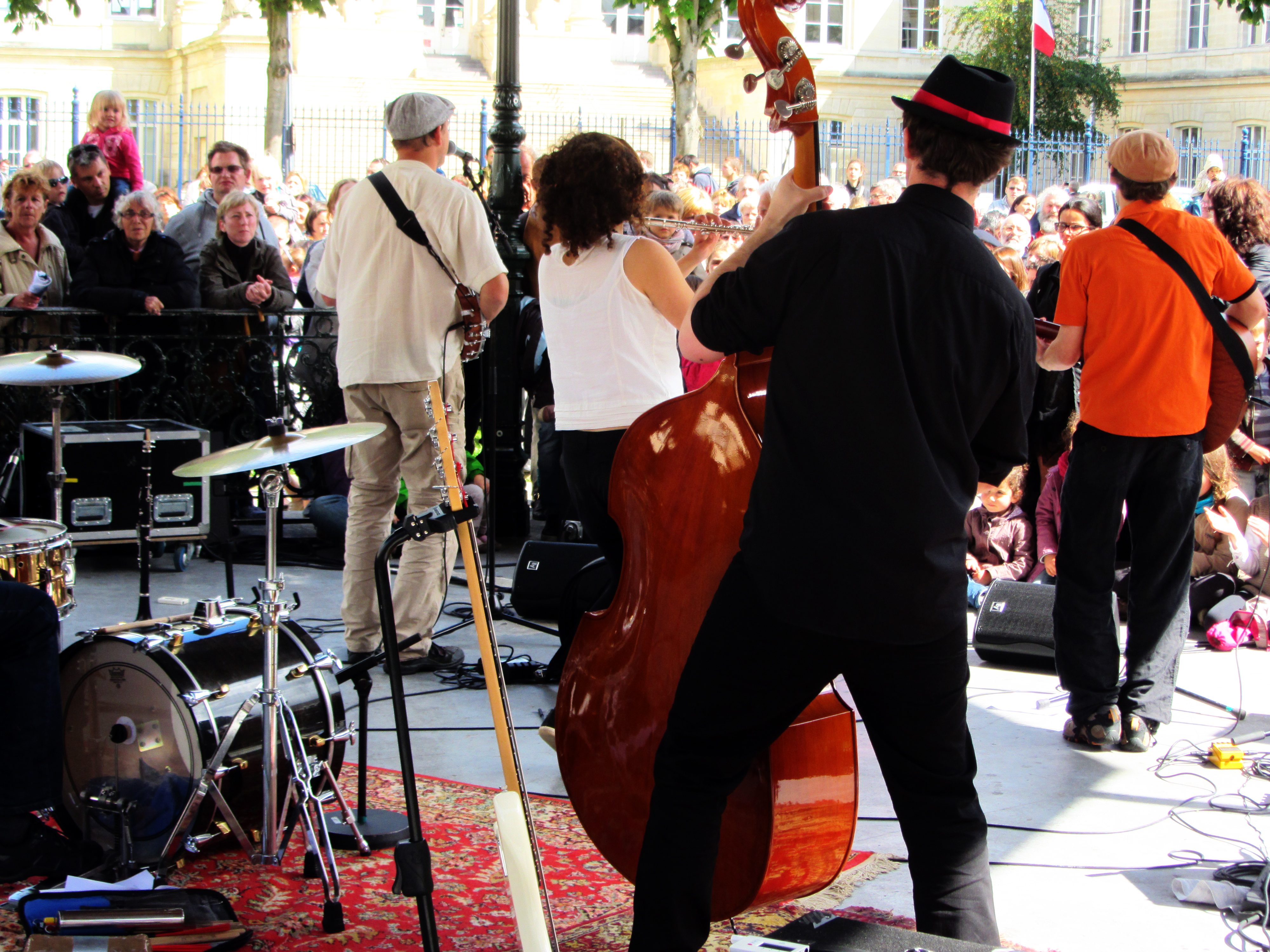 Un été en musique à Amiens (Kiosque Jules Bocquet - 2013)